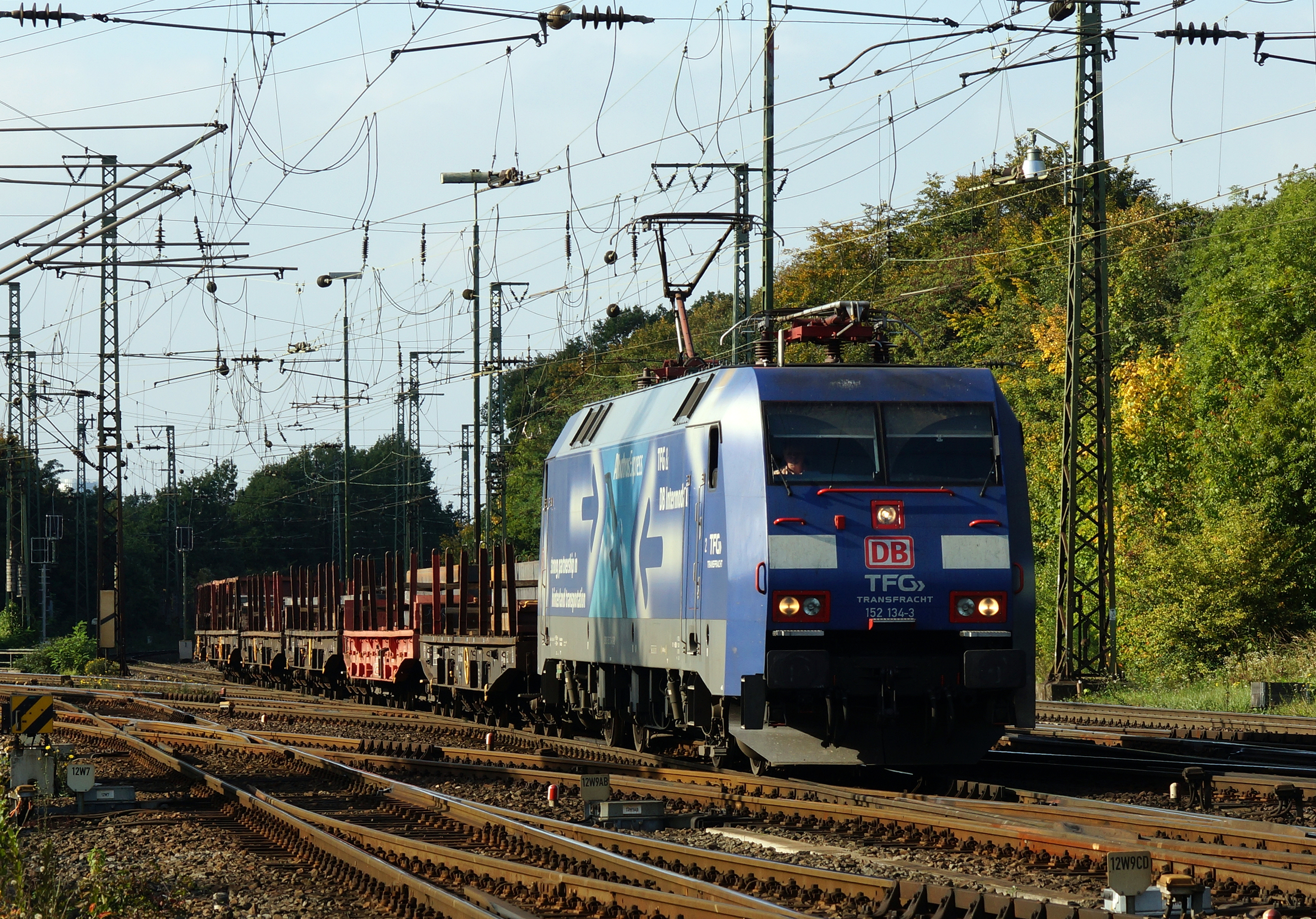 DBAG/Transfracht 152 134-3 in der Nähe vom Rangierbahnhof Gremberg.